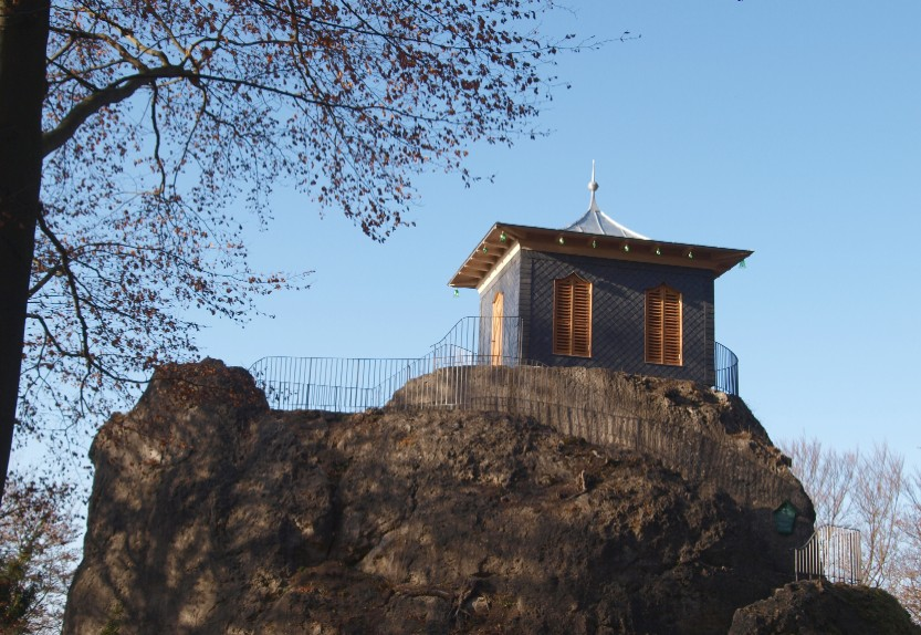 Das wiederaufgebaute Chinesische Häuschen im Schlosspark Altenstein am Tage vor seiner Eröffnung.